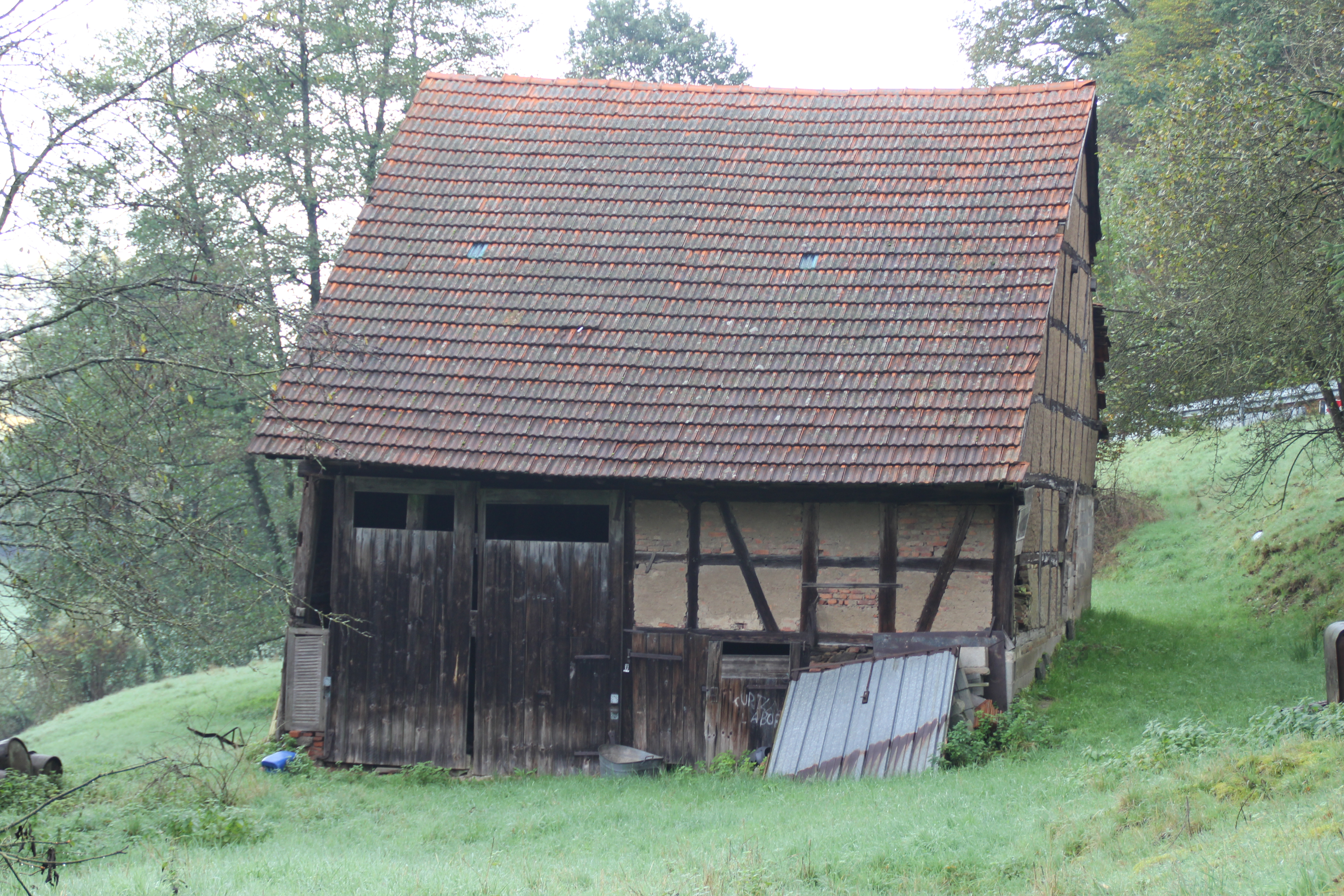 Ein Nebengebäude der ehem. Reichenbacher Mühle bei Mömbris